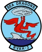 RVAH-3 insignia.